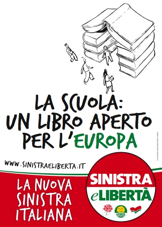 "La scuola un libro aperto per l'Europa"